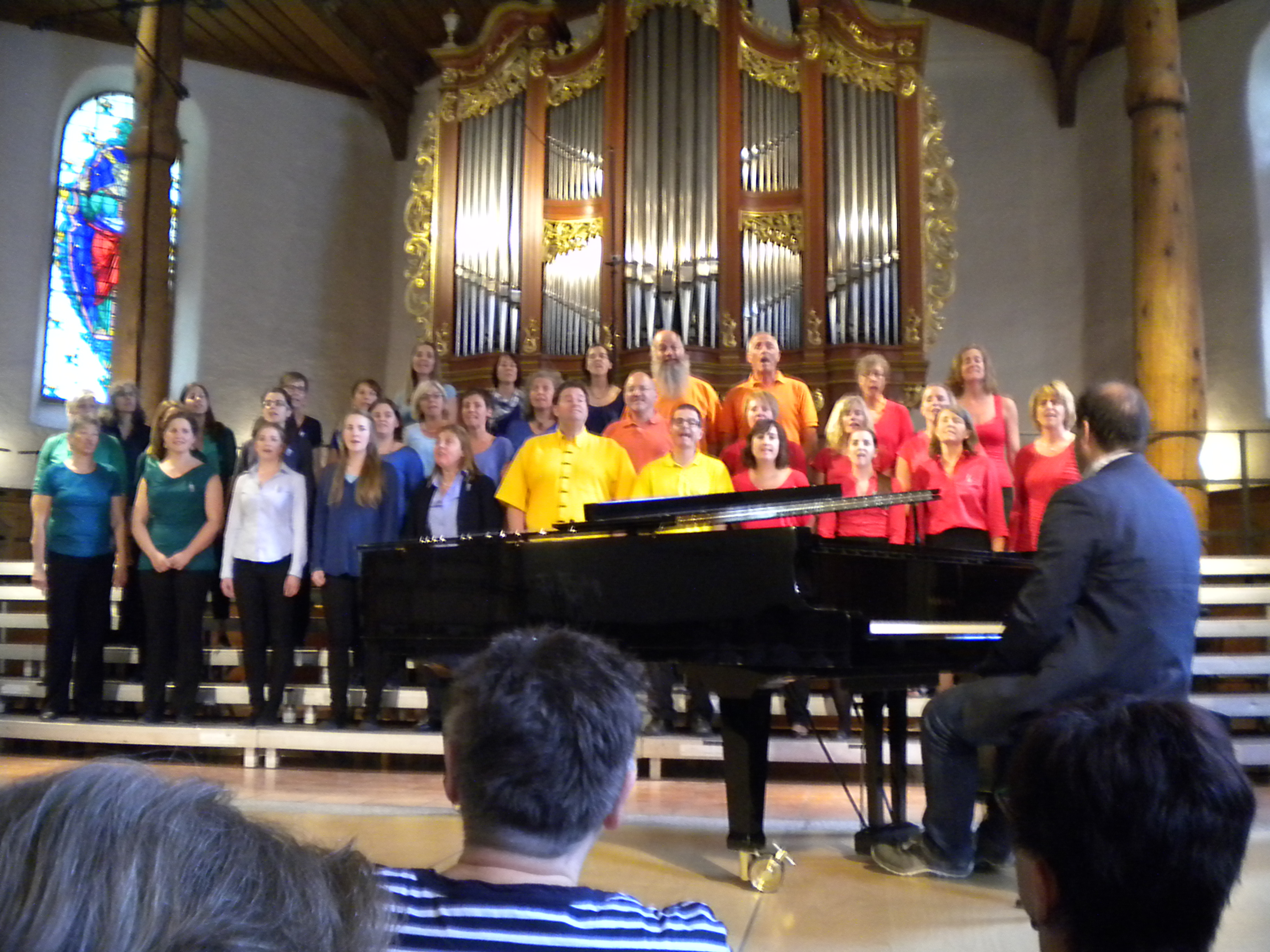 Schweizer Gesangsfest 2015, Meiringen BE, Schweiz